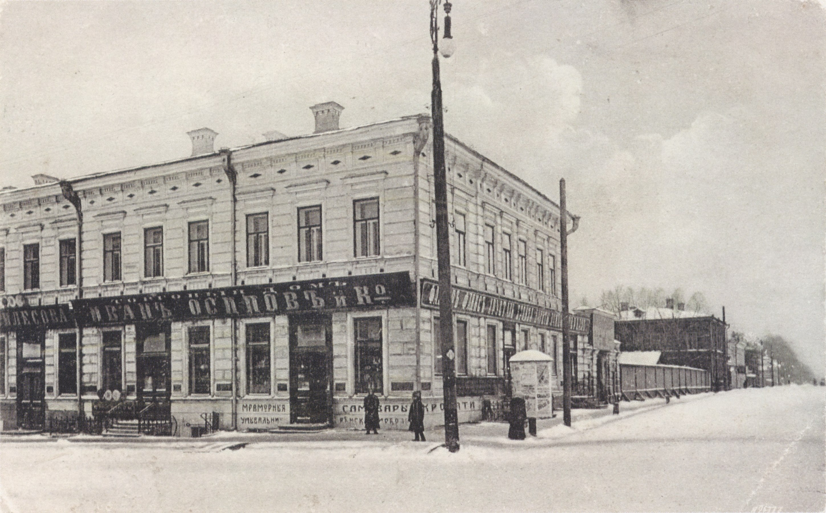 Торговый дом -Иван Осипов и Ко- в Перми